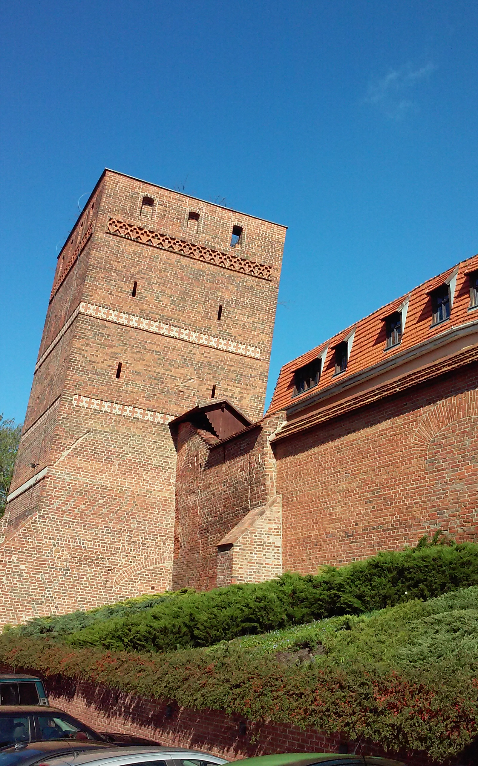 Krzywa Wieża - Toruń